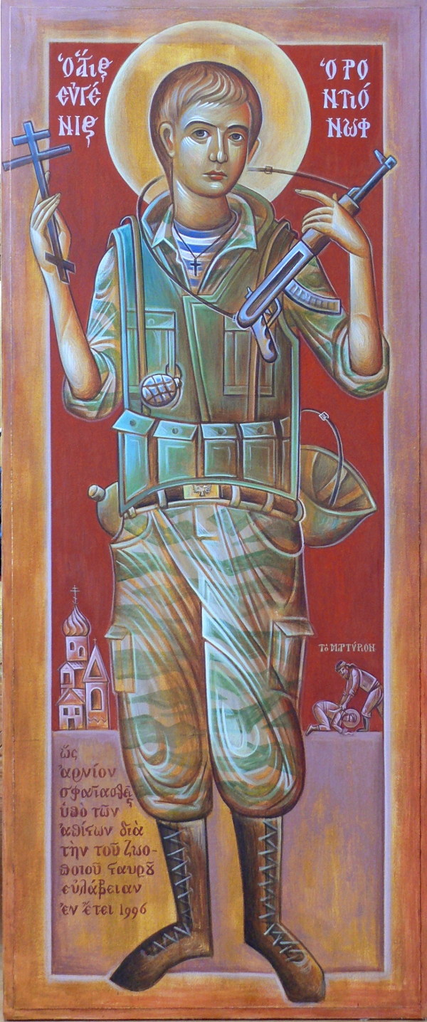 Родіонов Євгеній ікона